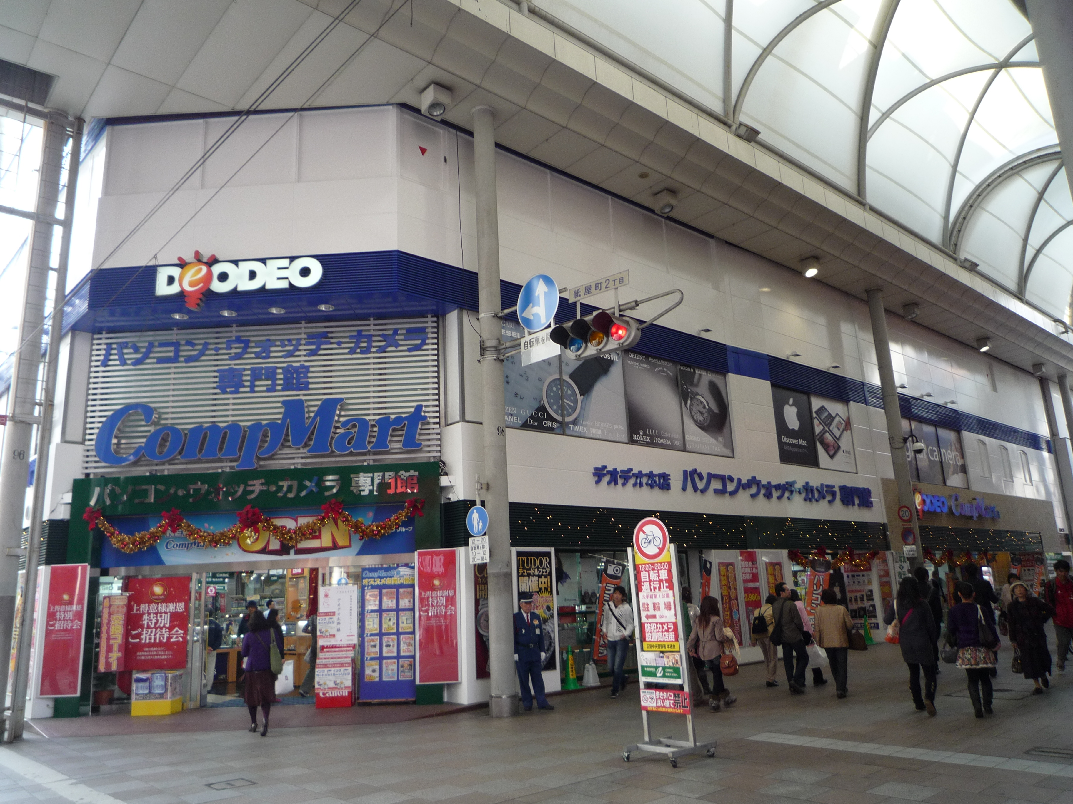 デオデオ本店コンプマートパソコン専門館